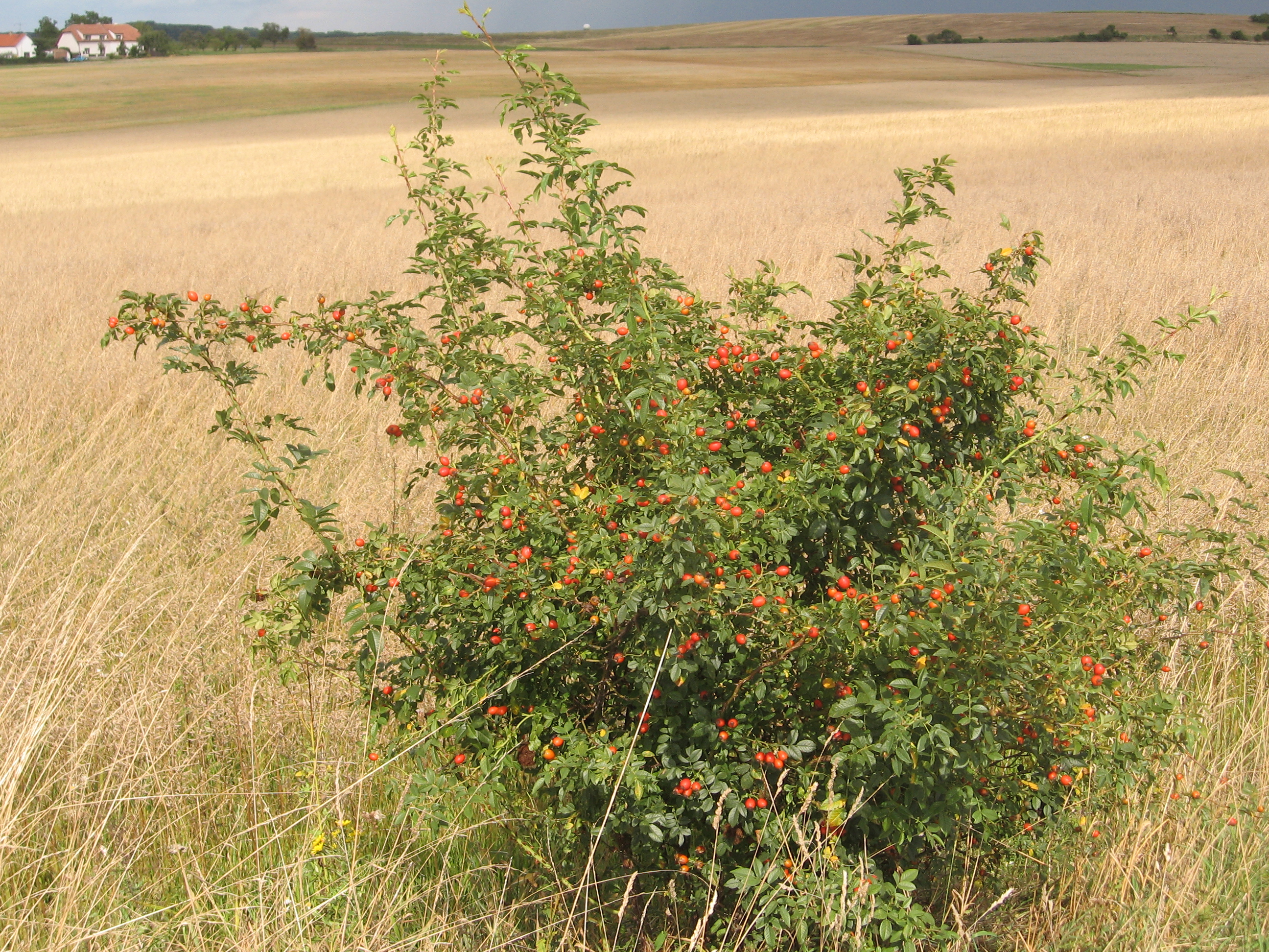 Šípkový keř u Ctiněvsi